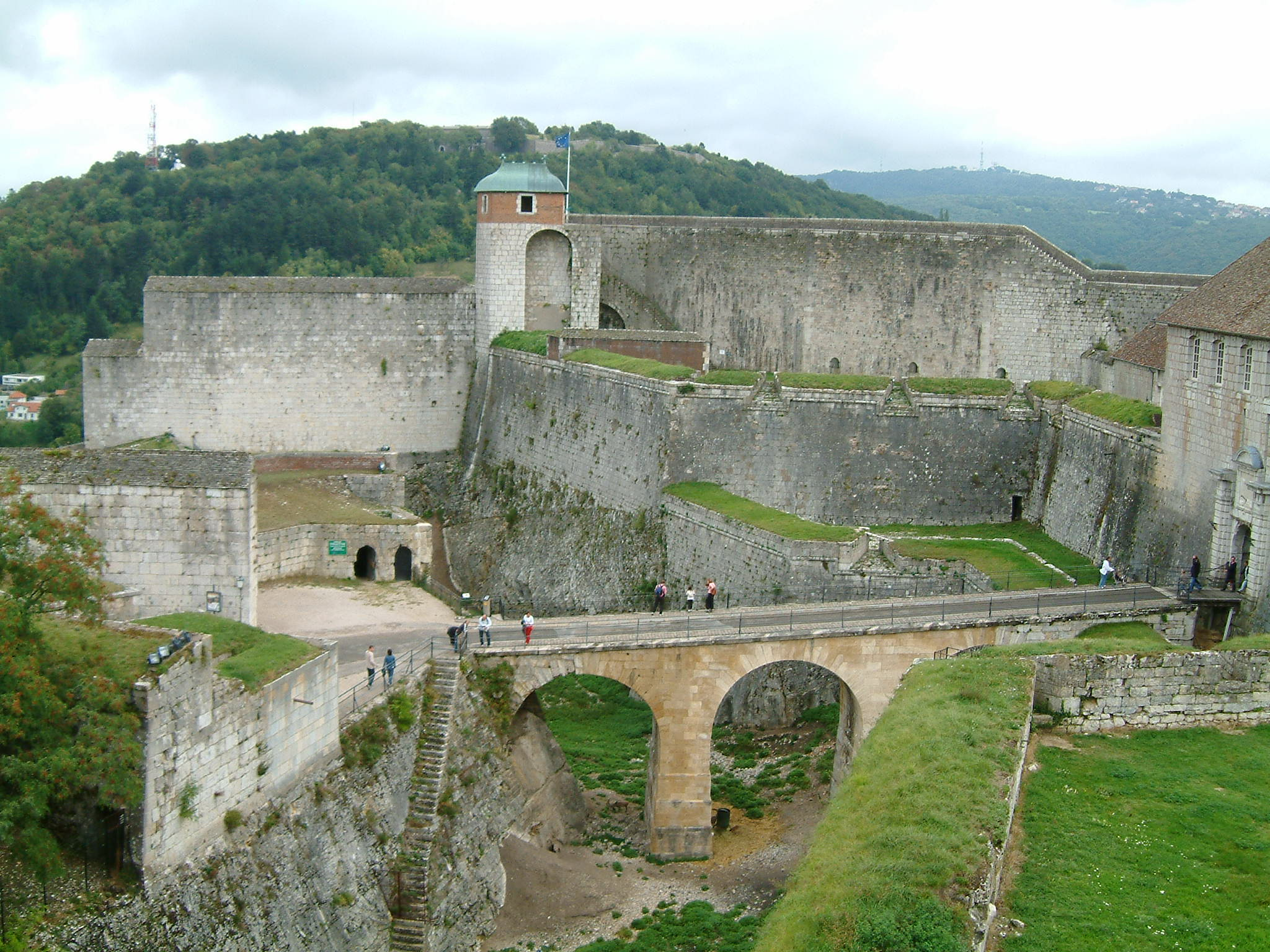 Description Citadelle de Besançon. Vue de l'entrée de la citadelle à partir de la tour de la Reine. La tour du Roi se trouve à l'arrière-plan. Date septembre 2004. Auteur Christophe.Finot